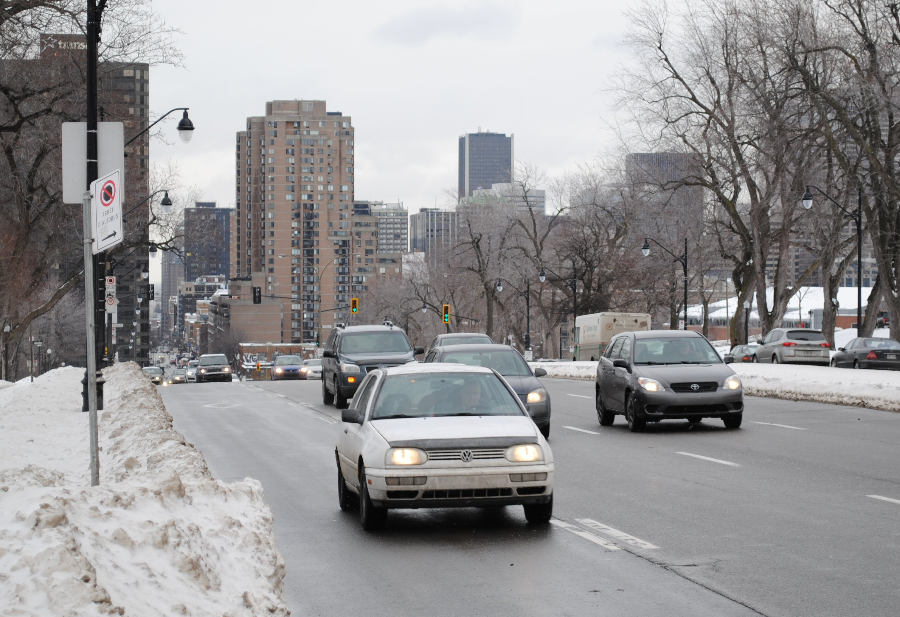 L'avenue du Parc à Montreal